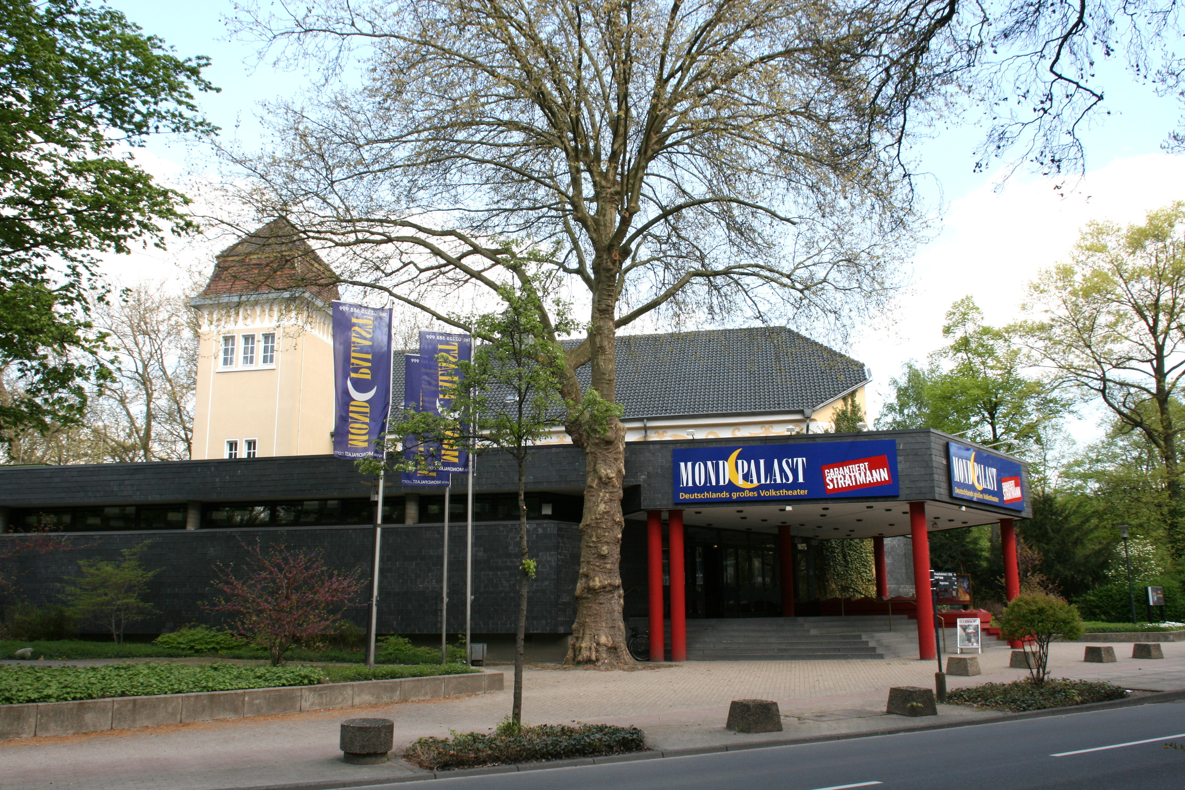 Mondpalast, Wilhelmstraße 26 in Herne